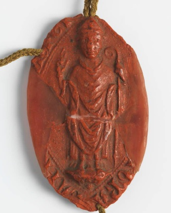 Báncsa István bíboros pecsétje 1270-ben